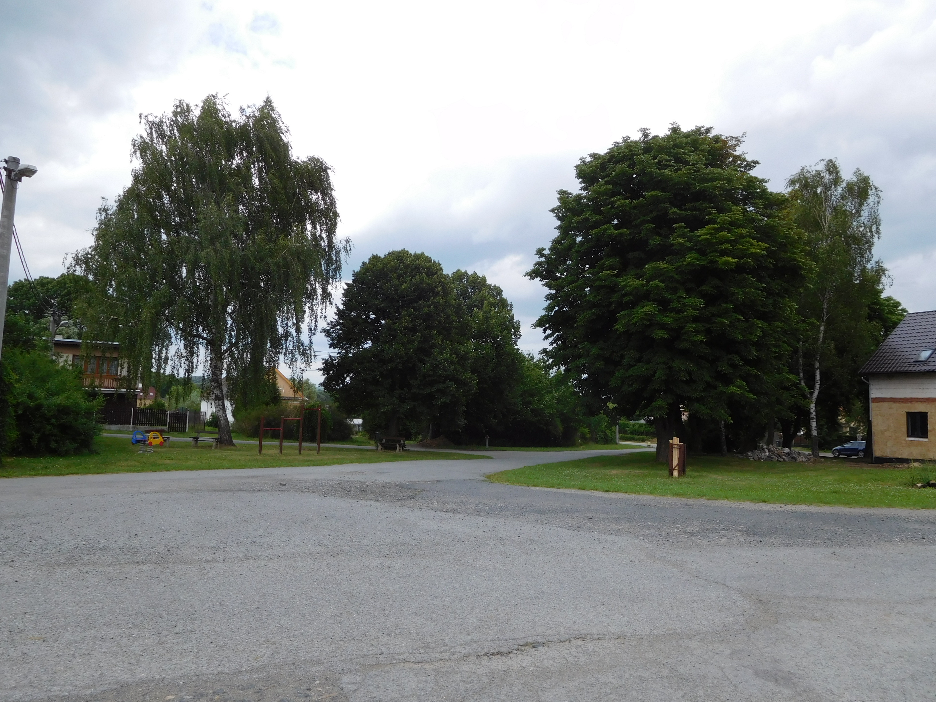 Myslinka - náves s minihřištěm